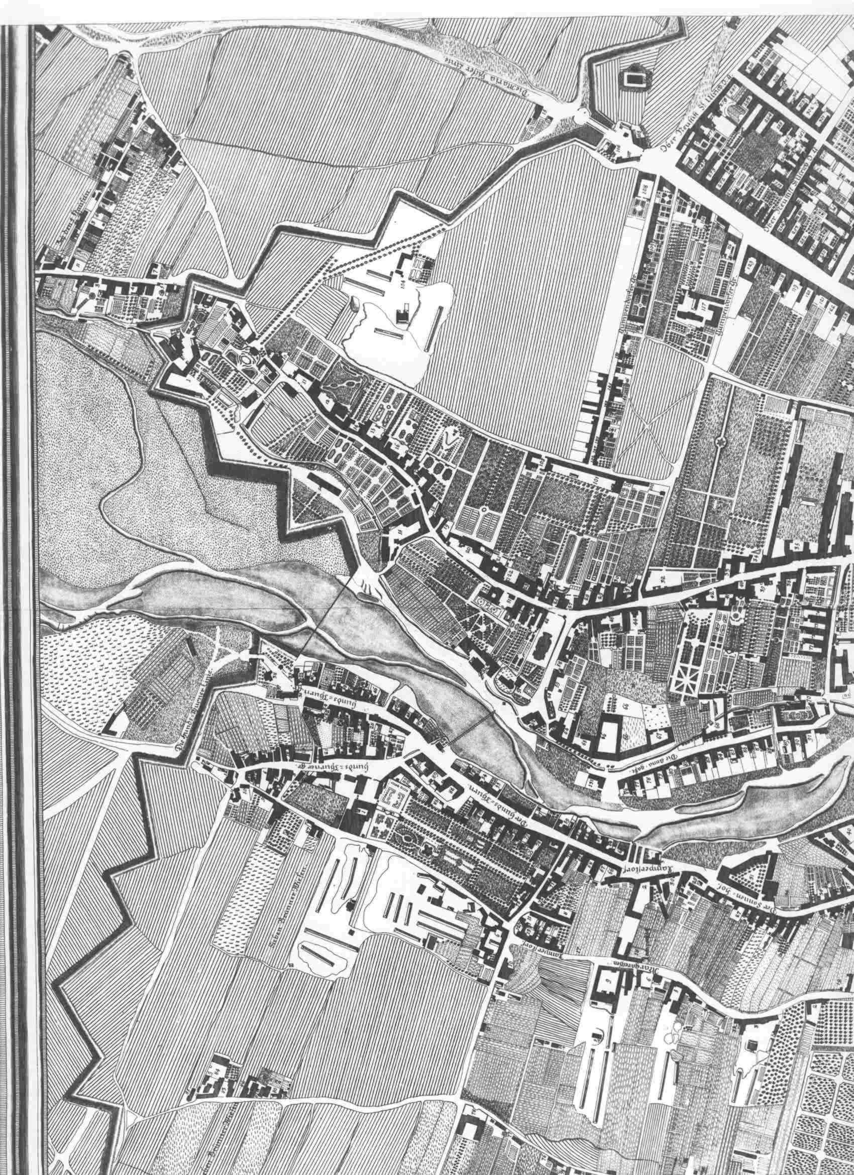 Vorstadt Hundsturm aus der Vogelperspektive